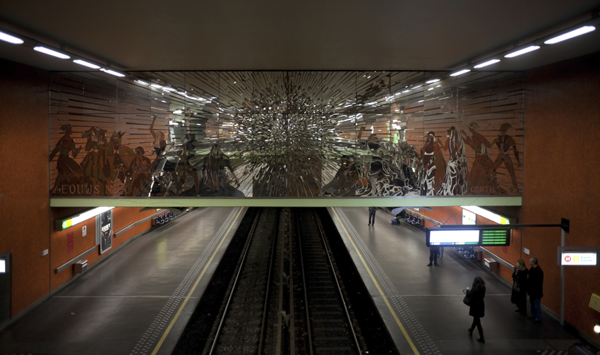 Stanice metra Thiefry v Bruselu, Belgie